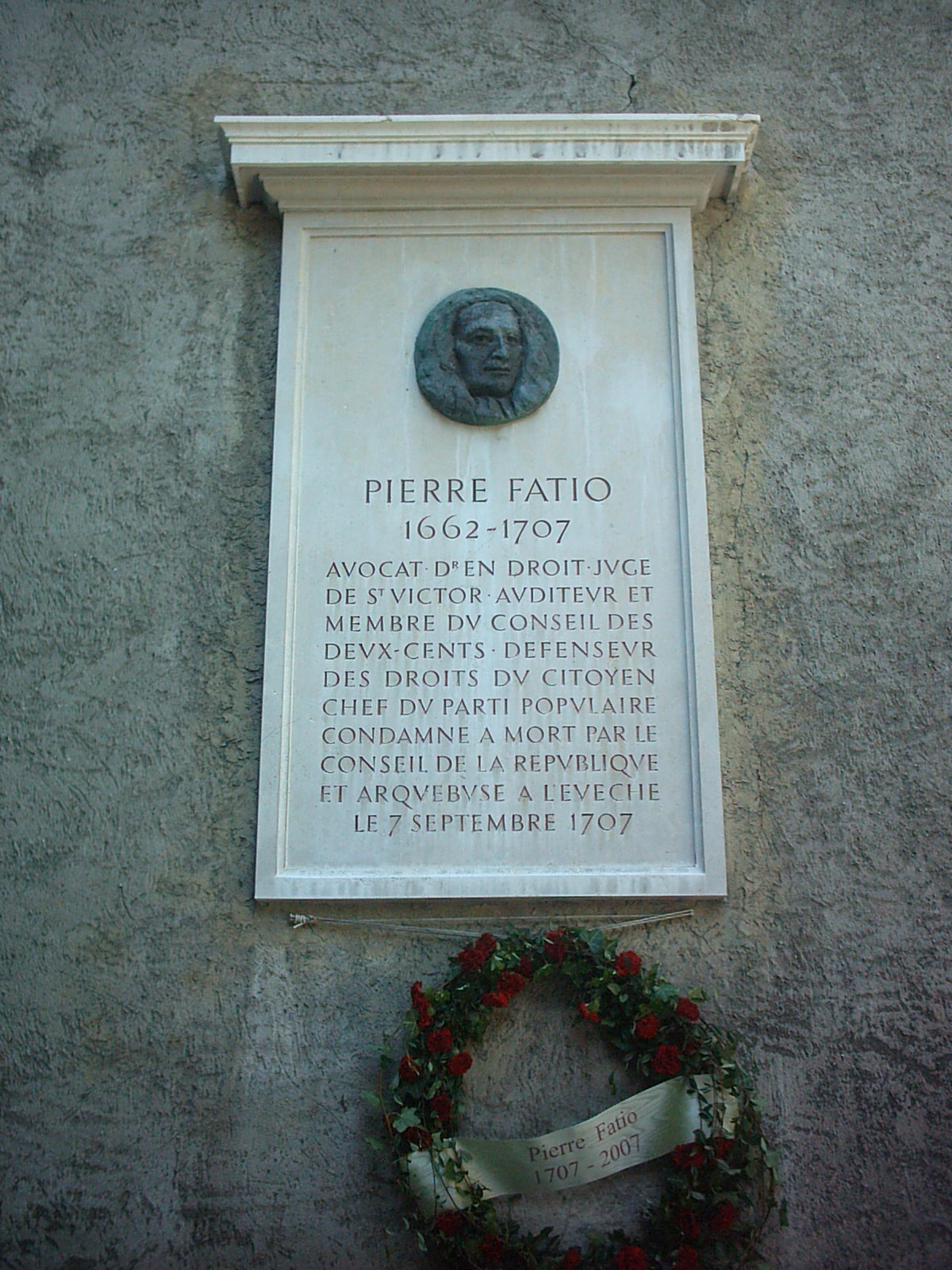 Plaque dédiée à Pierre Fatio à Genève (Suisse)